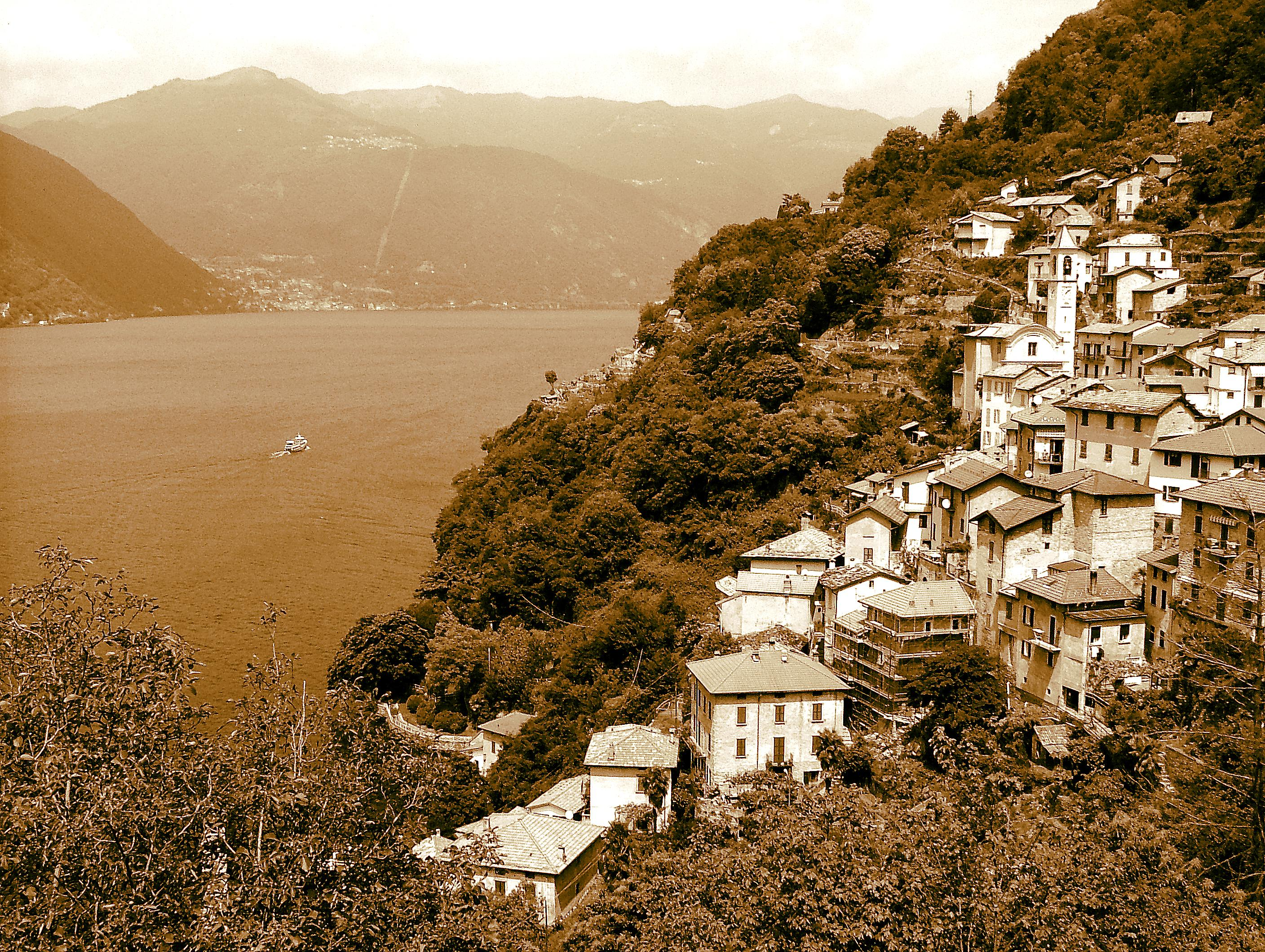 Nesso, Lago di Como (taly). Panorama